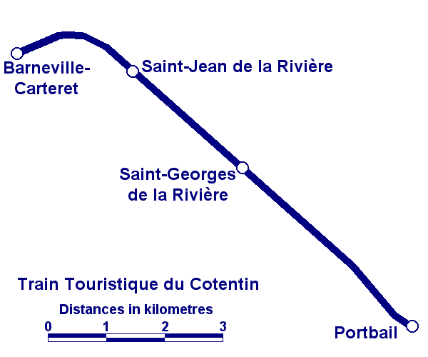 Plan of Train Touristique du Cotentin, Normandie.